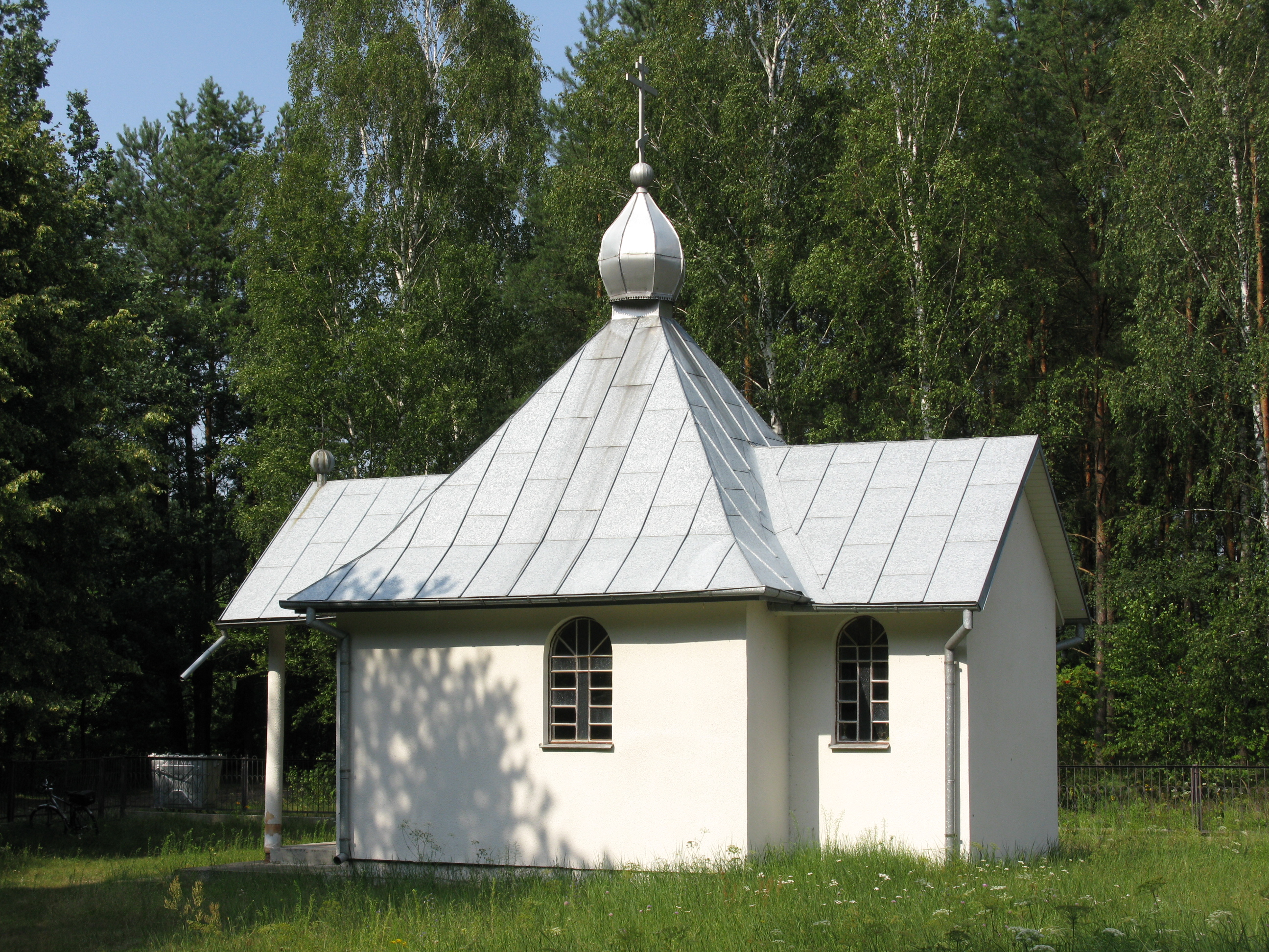 Kaplica cmentarna pw. Świętych Niewiast Niosących Wonności w Dubnie.